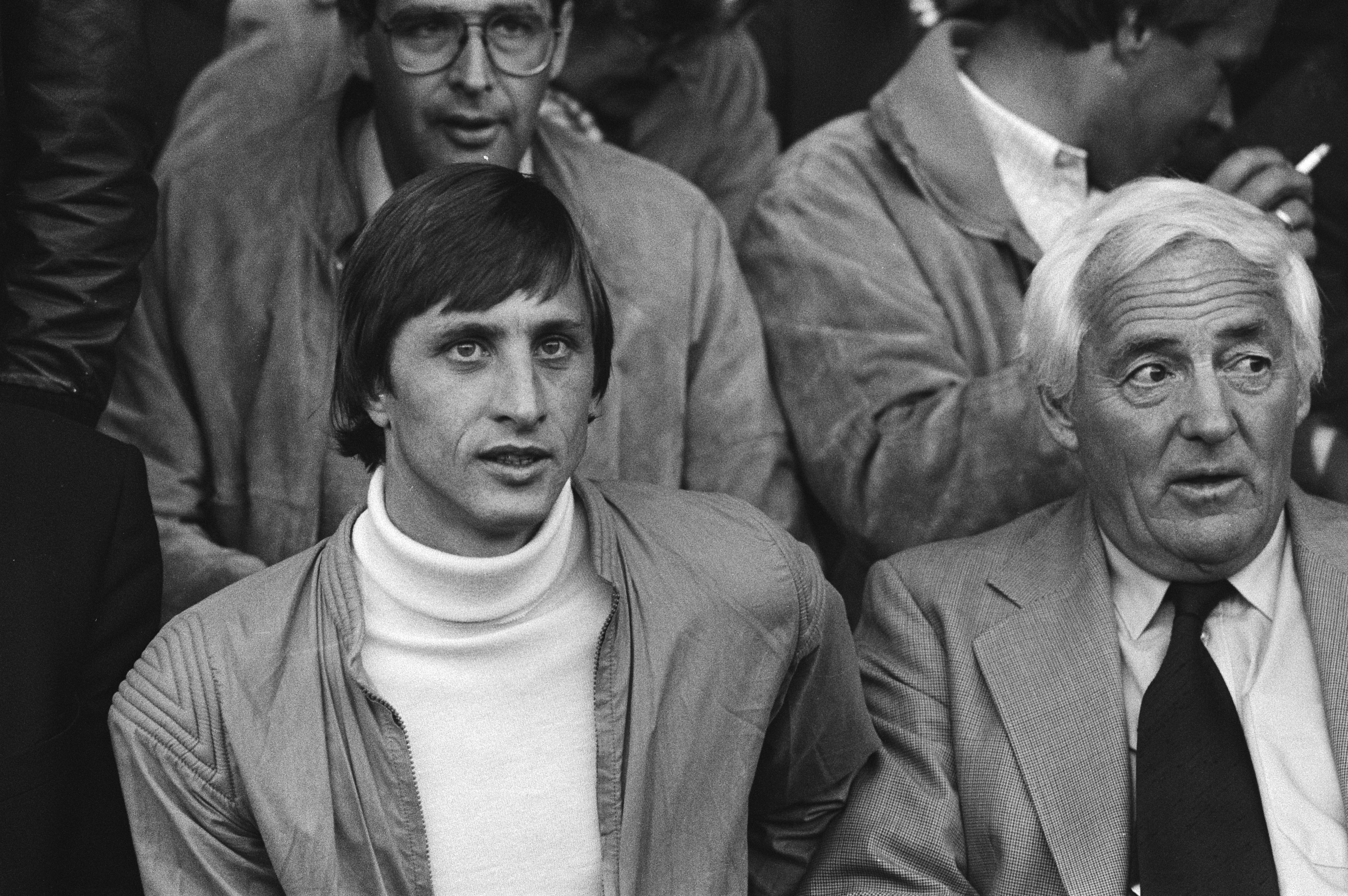 Collectie / Archief : Fotocollectie Anefo Reportage / Serie : AZ '67 - Ajax 2-3 Beschrijving : Johan Cruijff en voetbalmakelaar Cor Coster (r) op de tribune Datum : 15 september 1979 Locatie : Alkmaar, Noord-Holland Trefwoorden : groepsportretten, makelaars, sport, tribunes, voetbal Persoonsnaam : Coster, Cor, Cruijff, Johan Instellingsnaam : AJAX Fotograaf : Suyk, Koen / Anefo Auteursrechthebbende : Nationaal Archief Materiaalsoort : Negatief (zwart/wit) Nummer archiefinventaris : bekijk toegang 2.24.01.05 Bestanddeelnummer : 930-4447